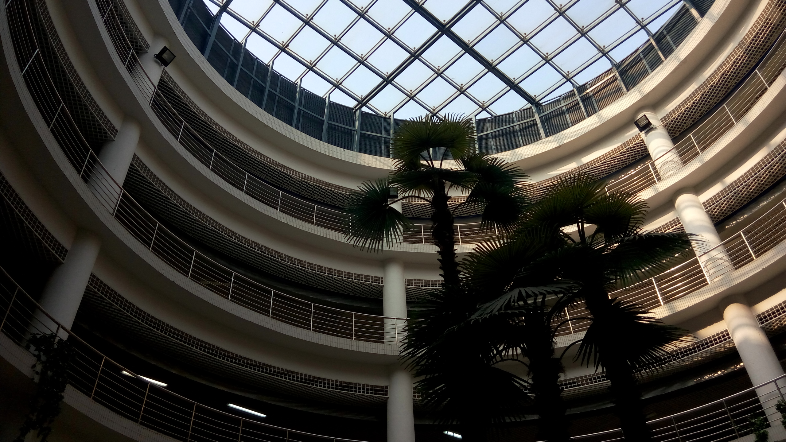 中文（中国大陆）: 广东南华工商职业学院图书馆